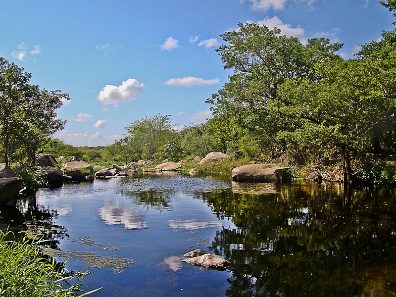 Rio Ingá